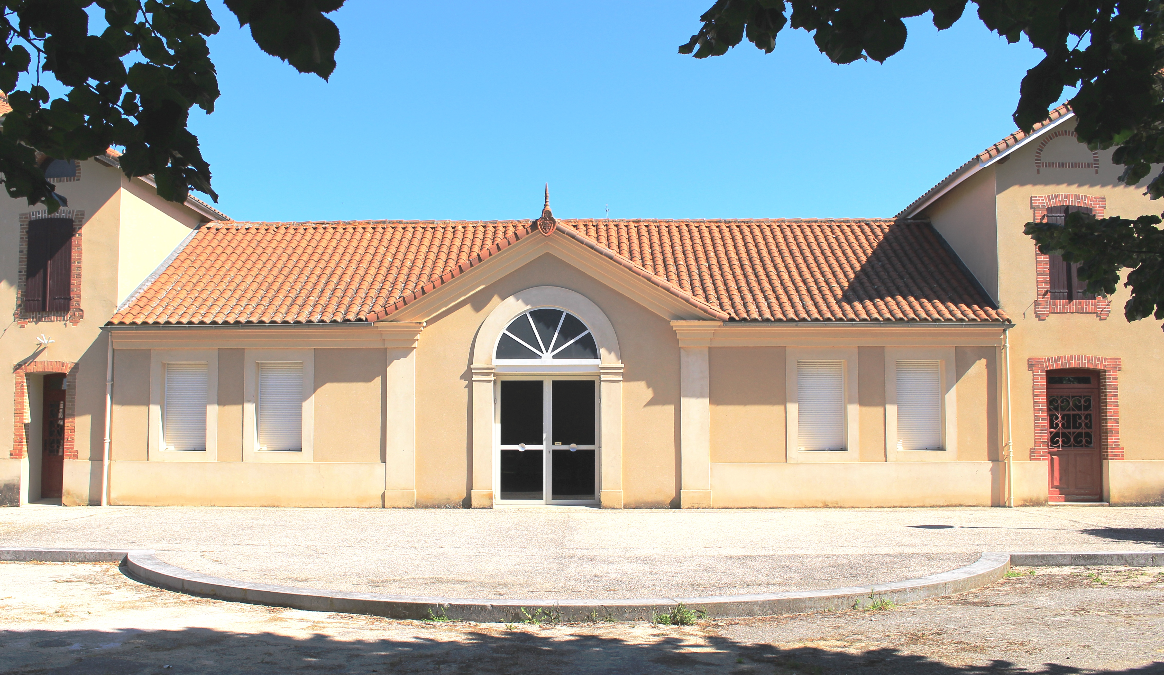 Salle des fêtes de Castelbajac (Hautes-Pyrénées)